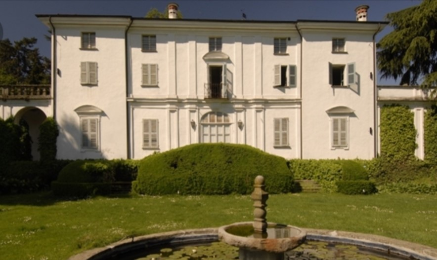 Il palazzo della Corte Piana